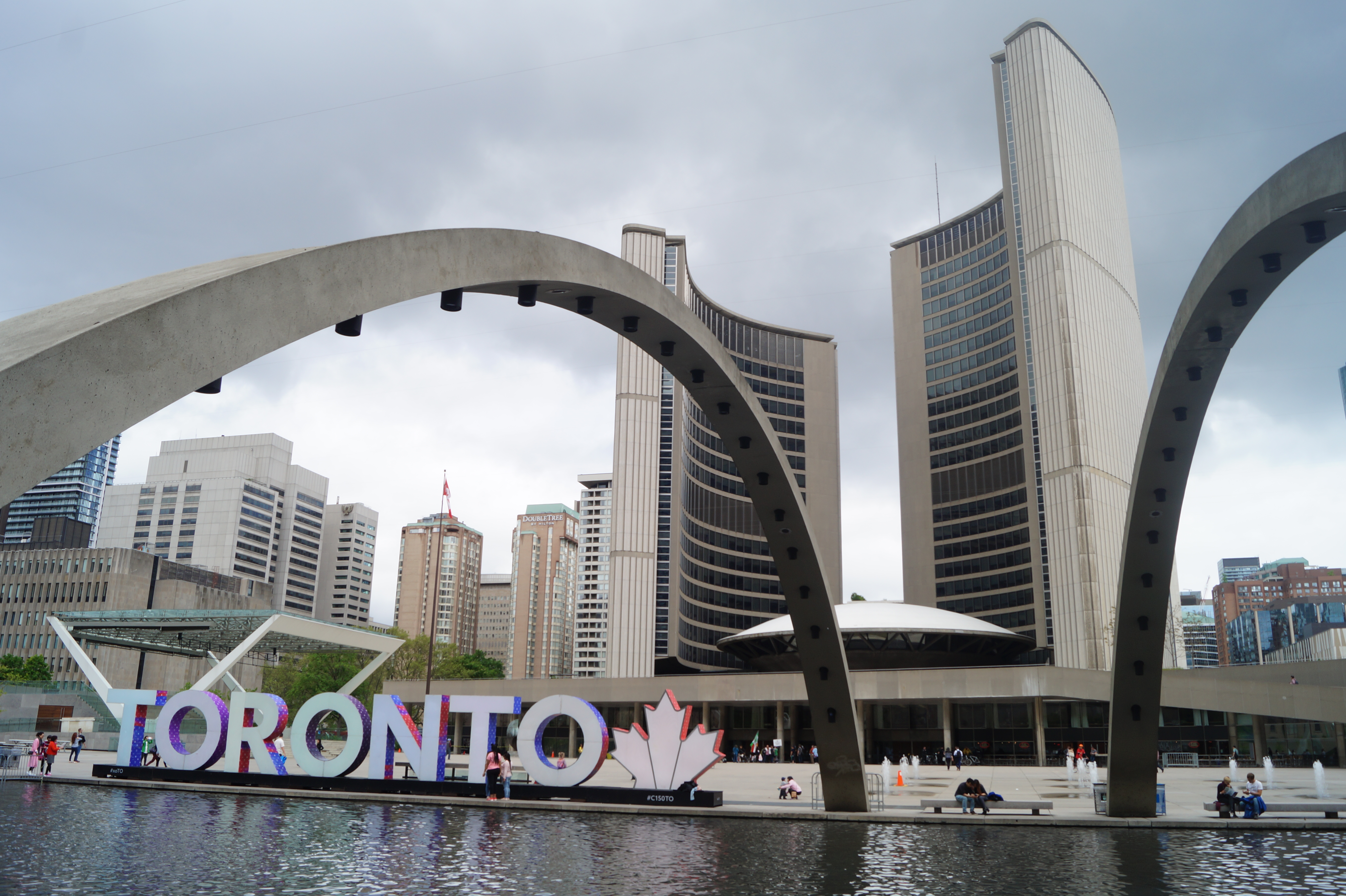 Toronto